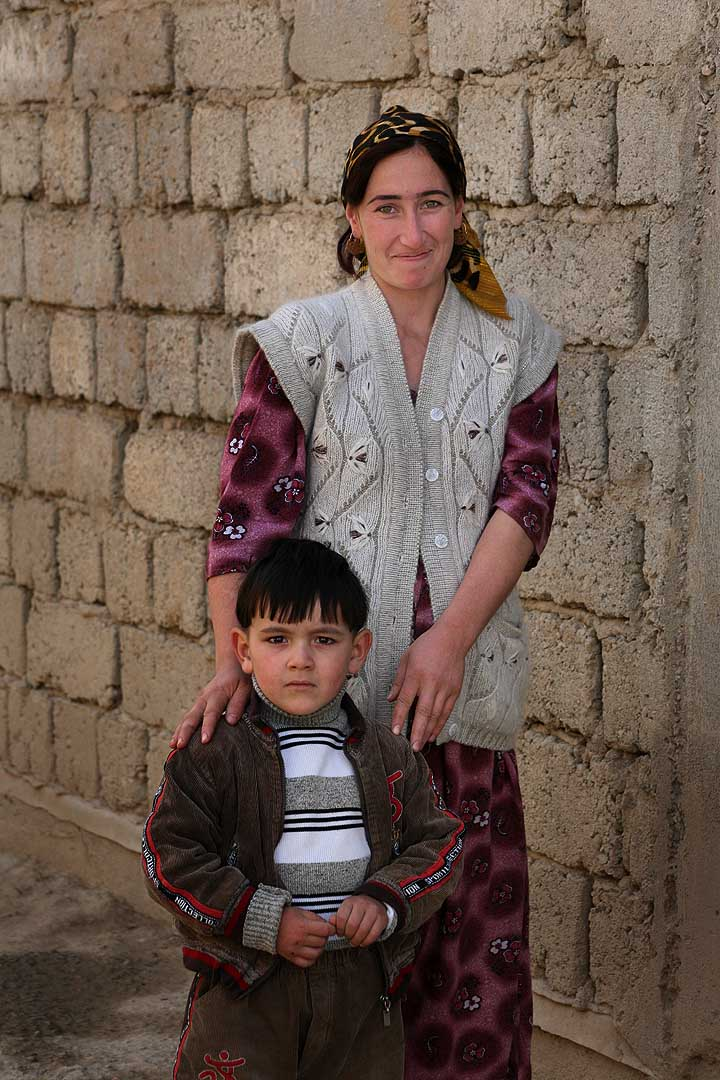 Tajik woman and child